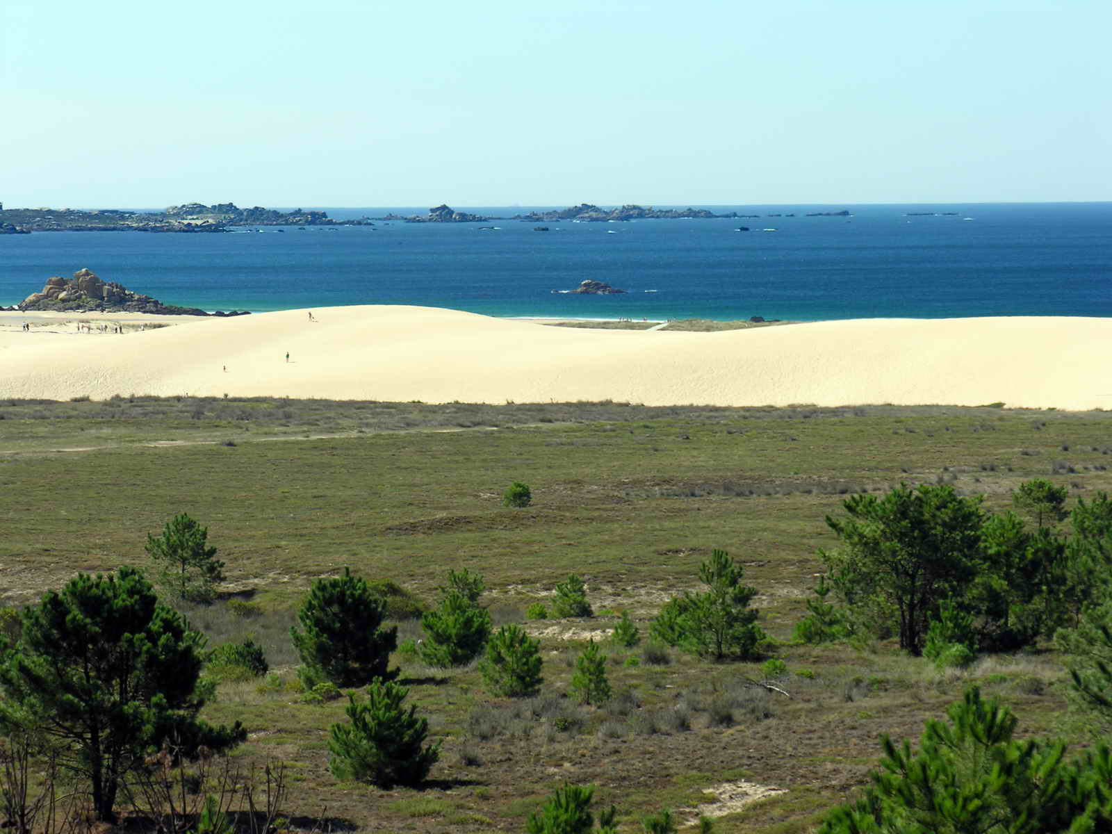 Castiñeiras - Ribeira - Galicia - Spain